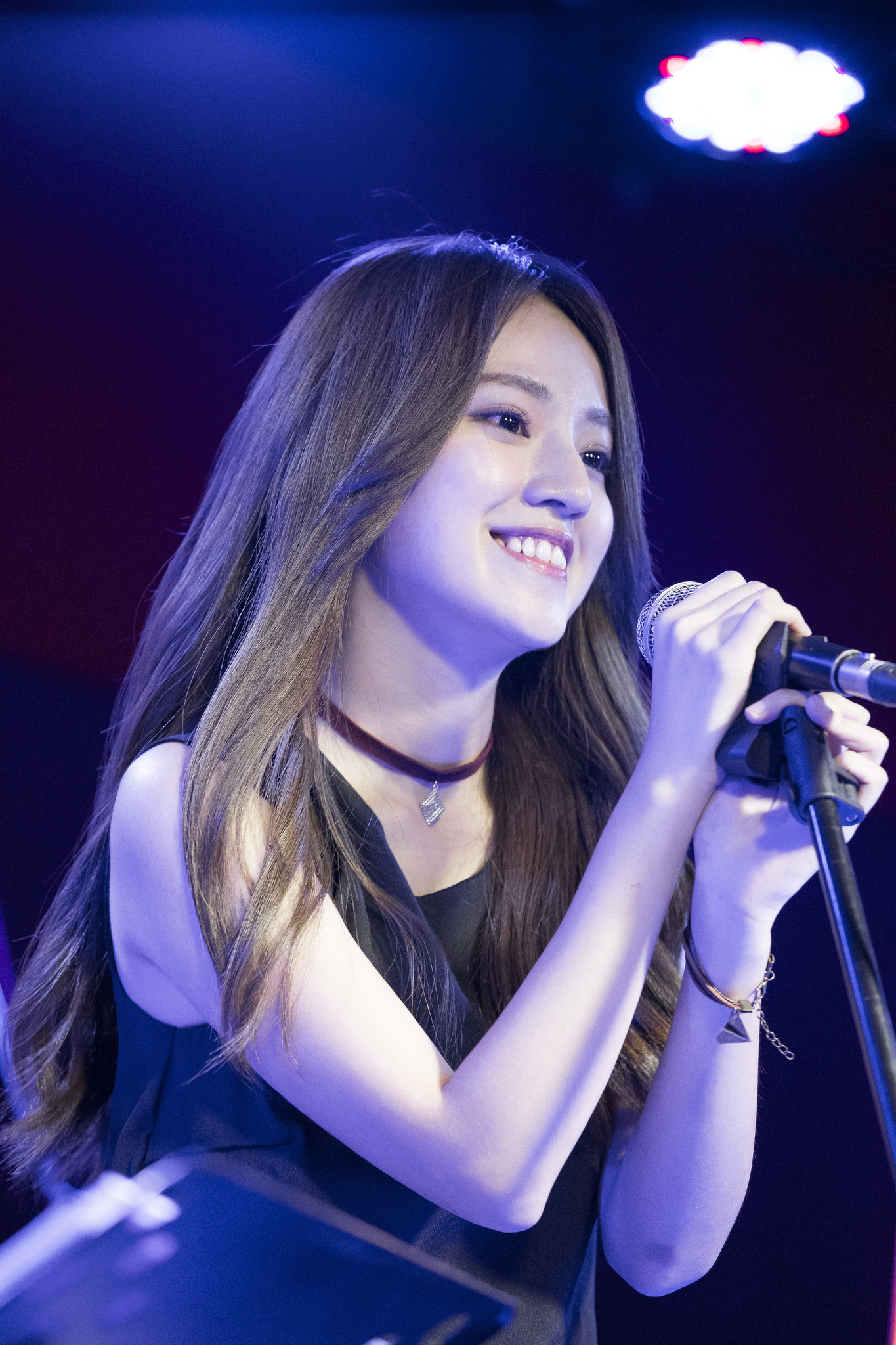 2016.09.24 安婕希 2016秋巡輕演唱（攝於河岸留言公館店）